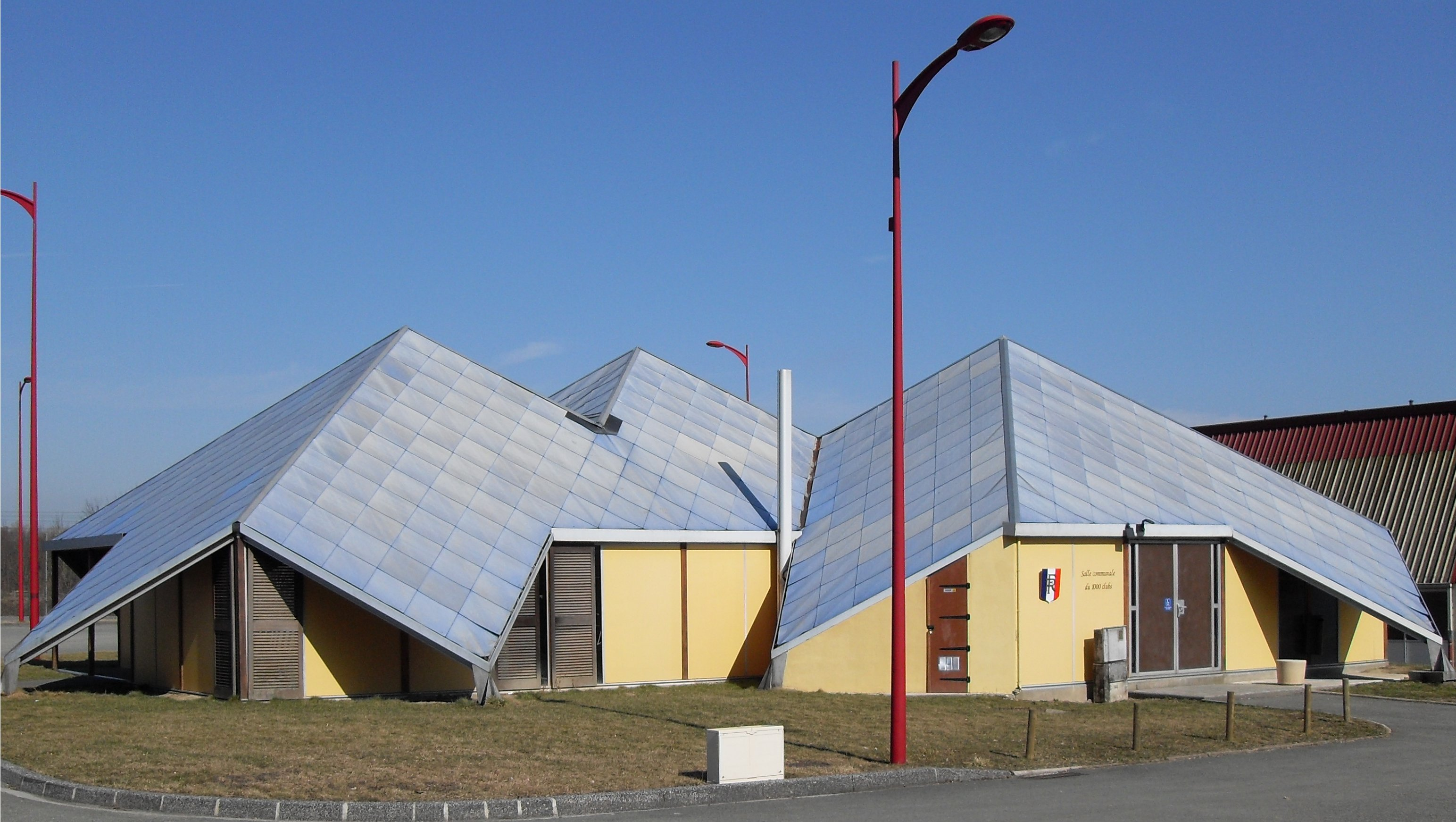 La salle communale de Montreux-Château